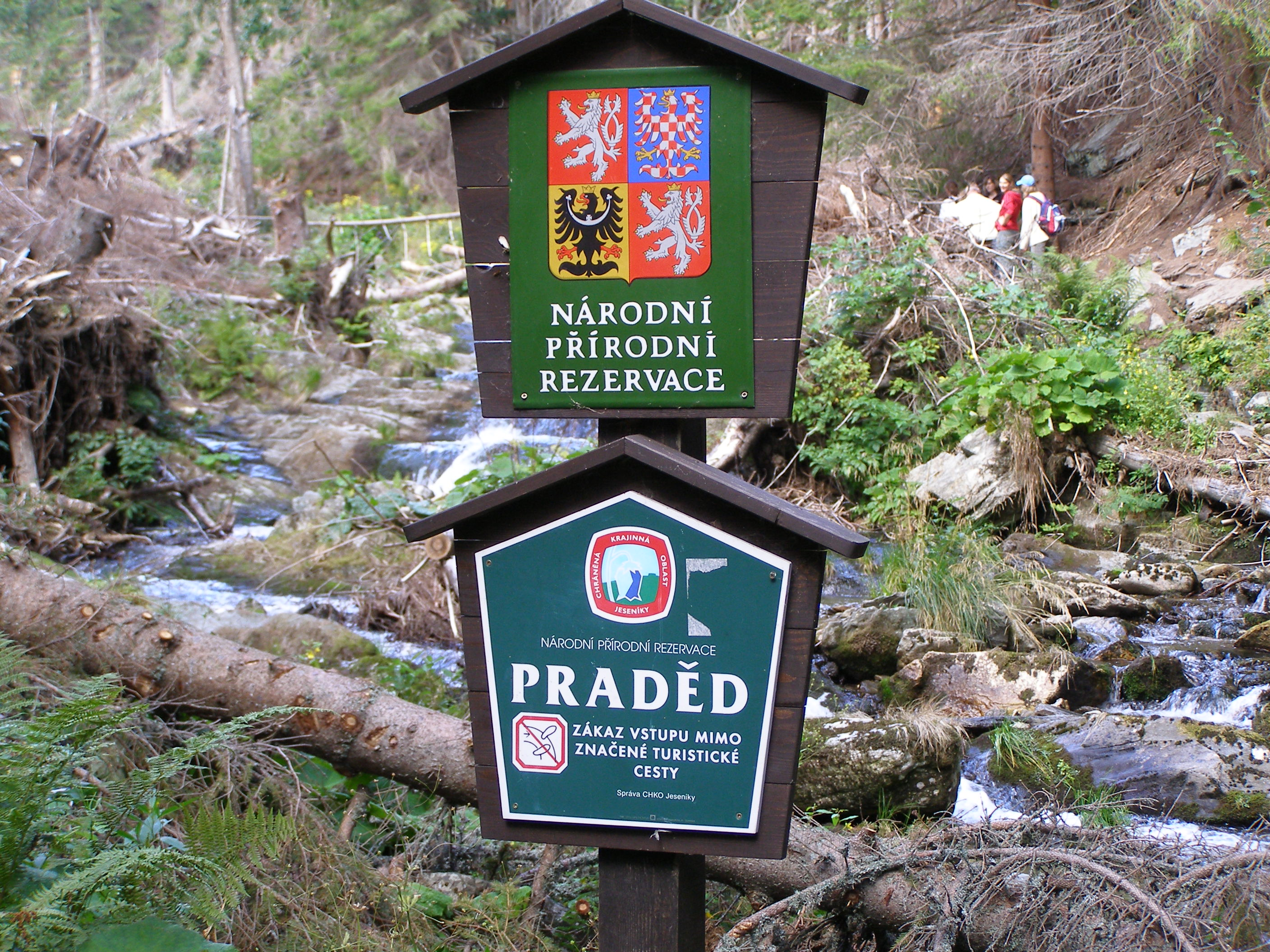 Národní přírodní rezervace Praděd